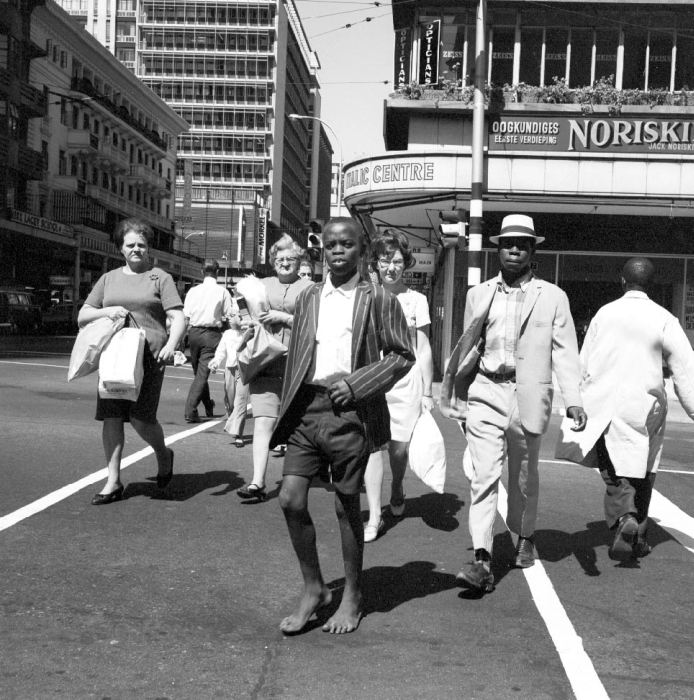 De foto is gemaakt tijdens de Afronautica Expeditie